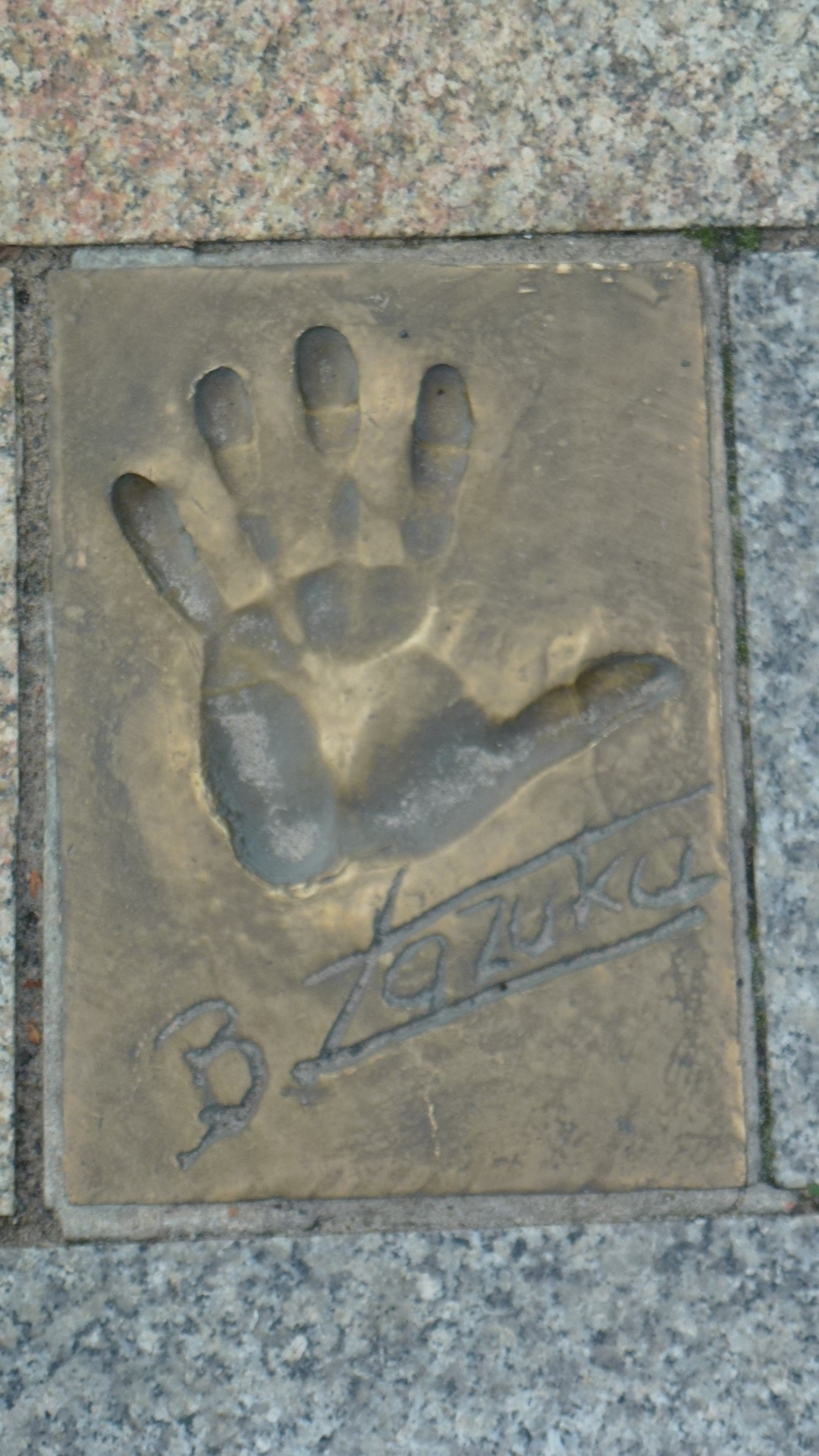 Odcisk gwiazdy na ul. Aleji Gwiazd w Międzyzdrojach woj. zachodniopomorskie pow. kamieński